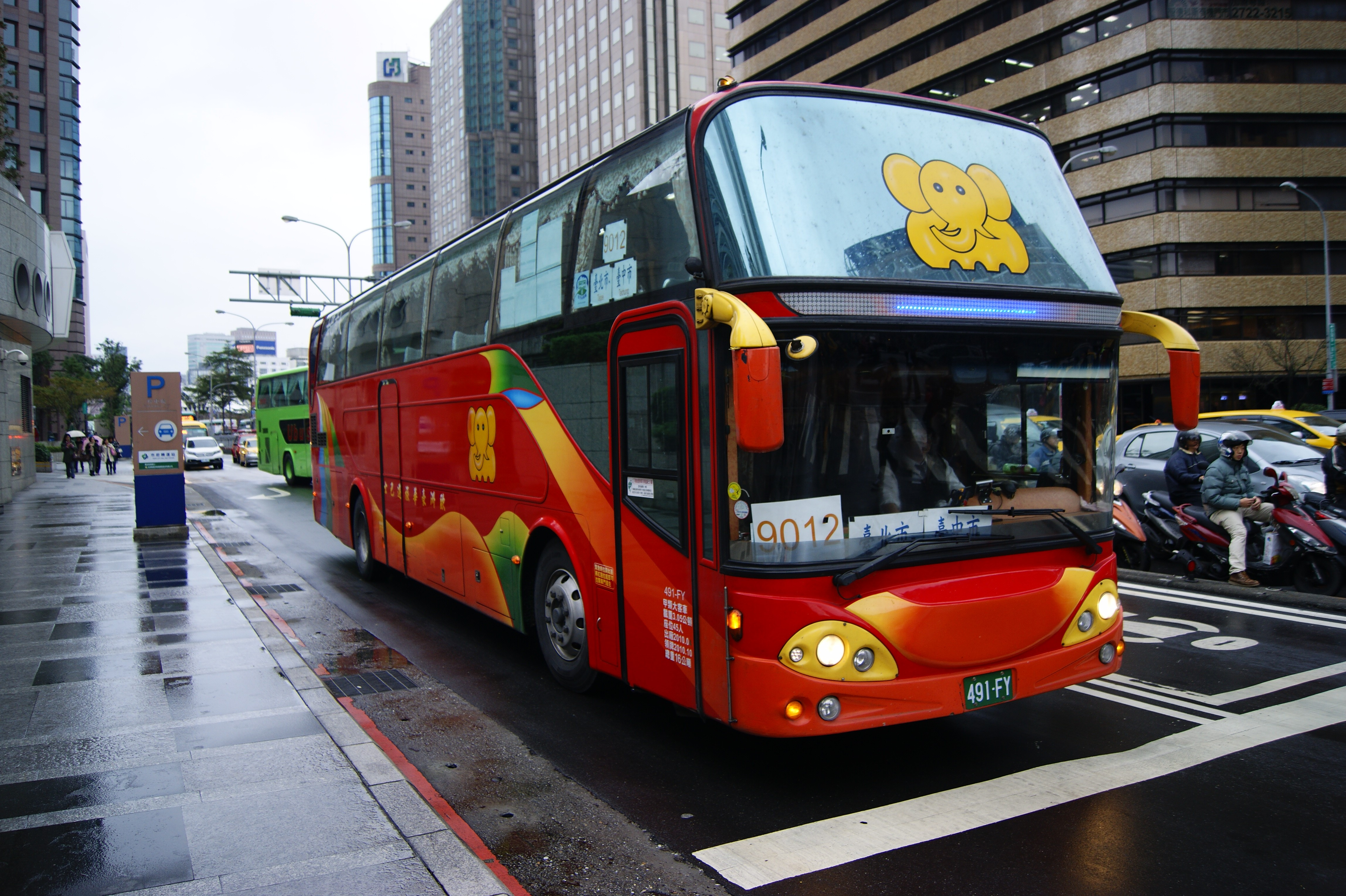 大有巴士 大吉車體2010 HINO RN8JSSU 491-FY